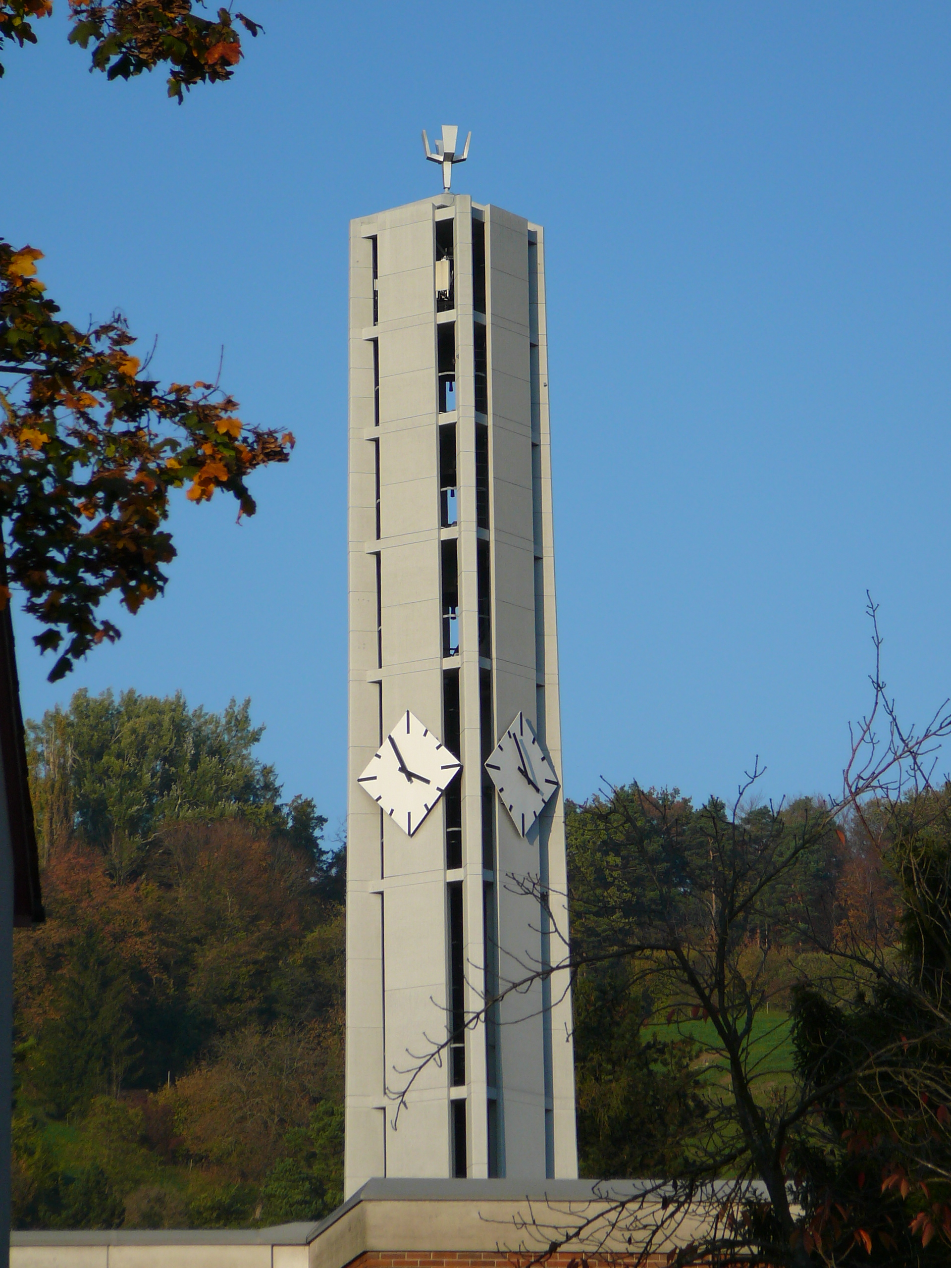 Römisch-katholische Pfarrkirche St. Laurentius Winterthur-Wülflingen, Glockenturm ganz